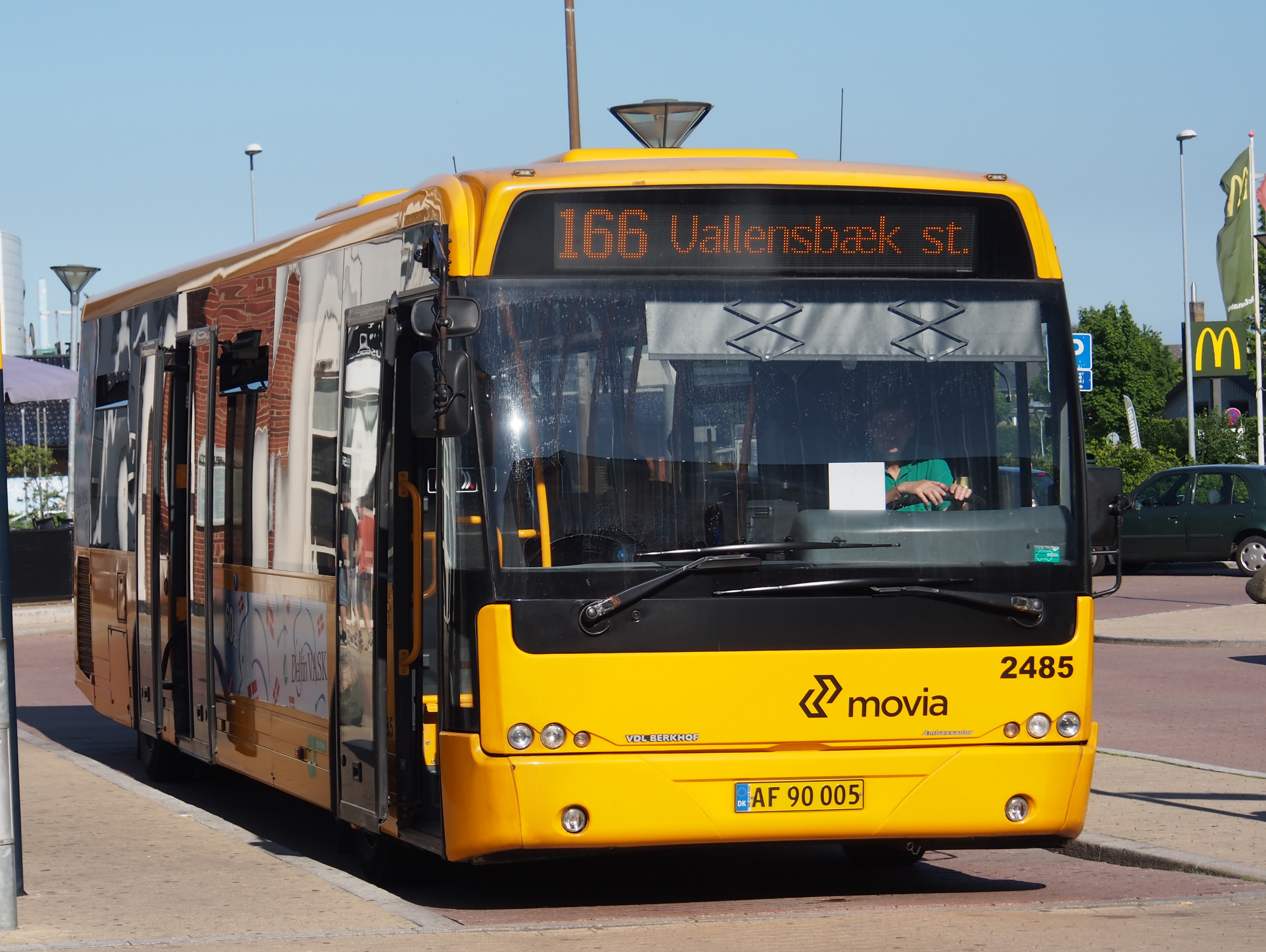 Photographed in Koge, Denmark.